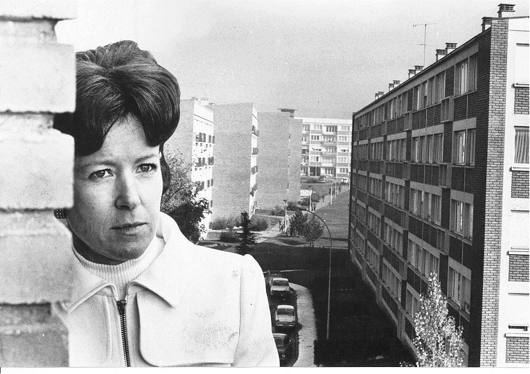 Britte Gros - Sénatrice maire de Meulan